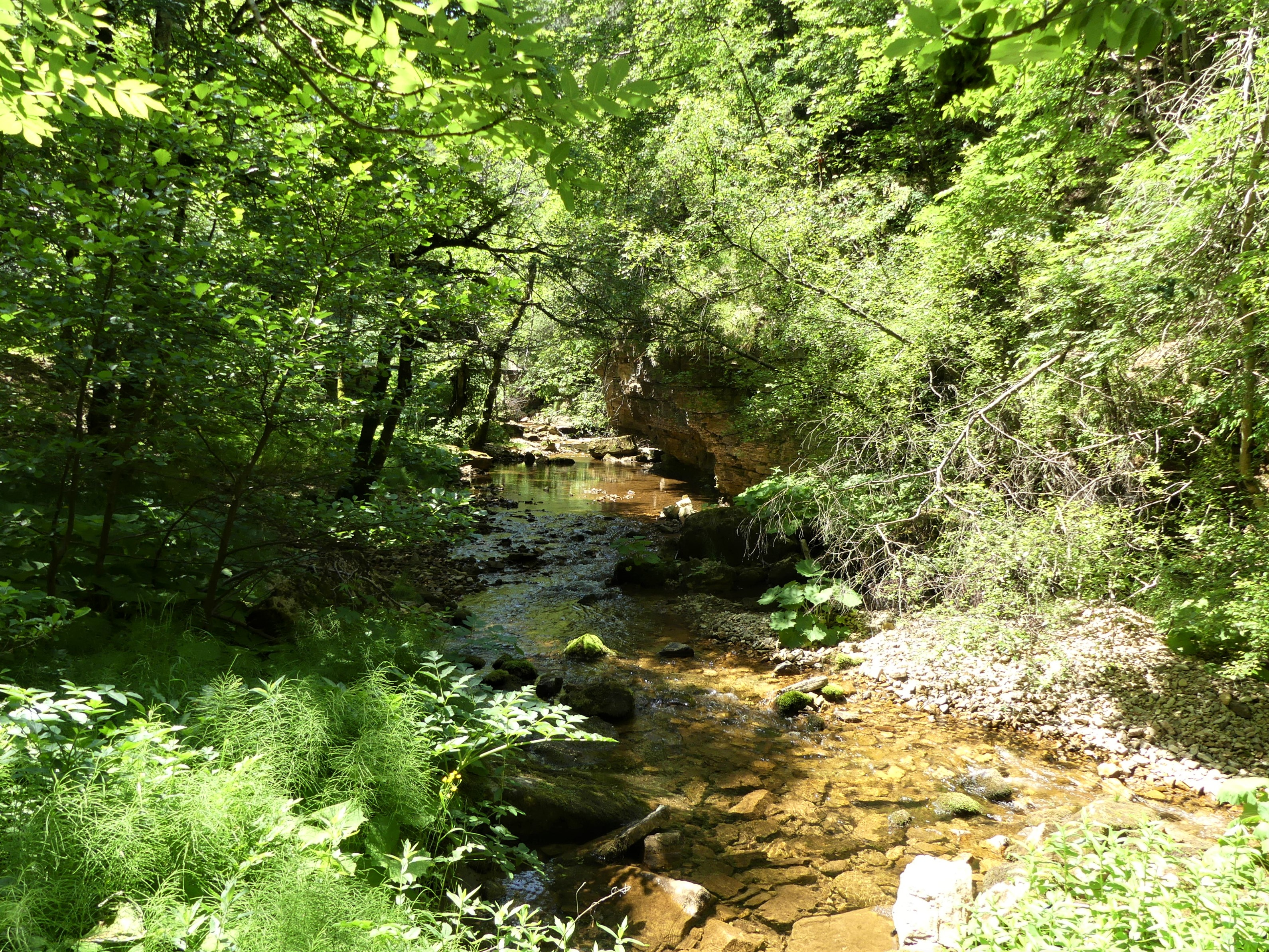 Le Bramabiau, quelques centaines de mètres en aval de l'abîme, Saint-Sauveur-Camprieu, Gard, France.